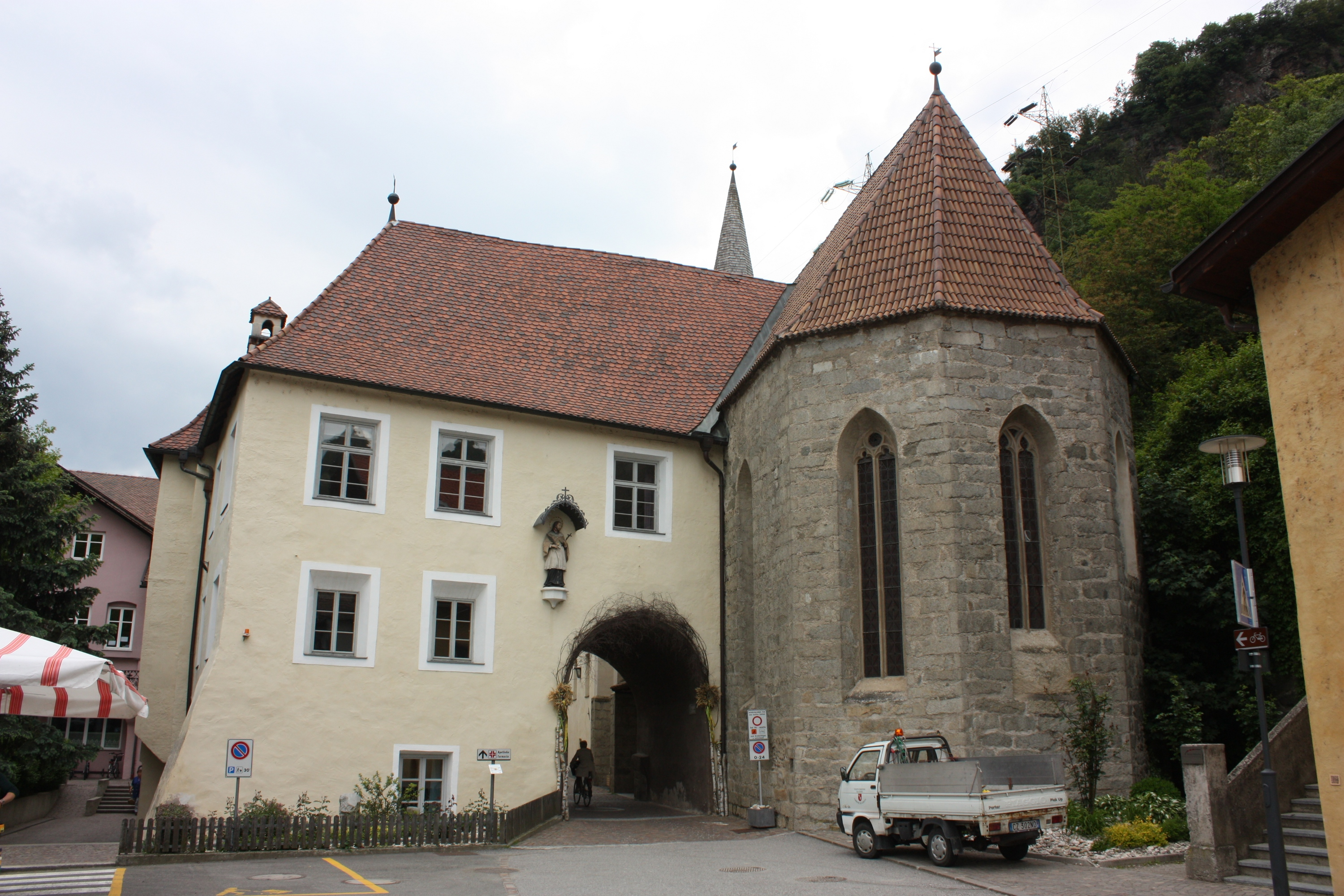 Klausen, Südtirol: Hospital, Apostelkirche und Brixner Tor vom Marktplatz aus gesehen